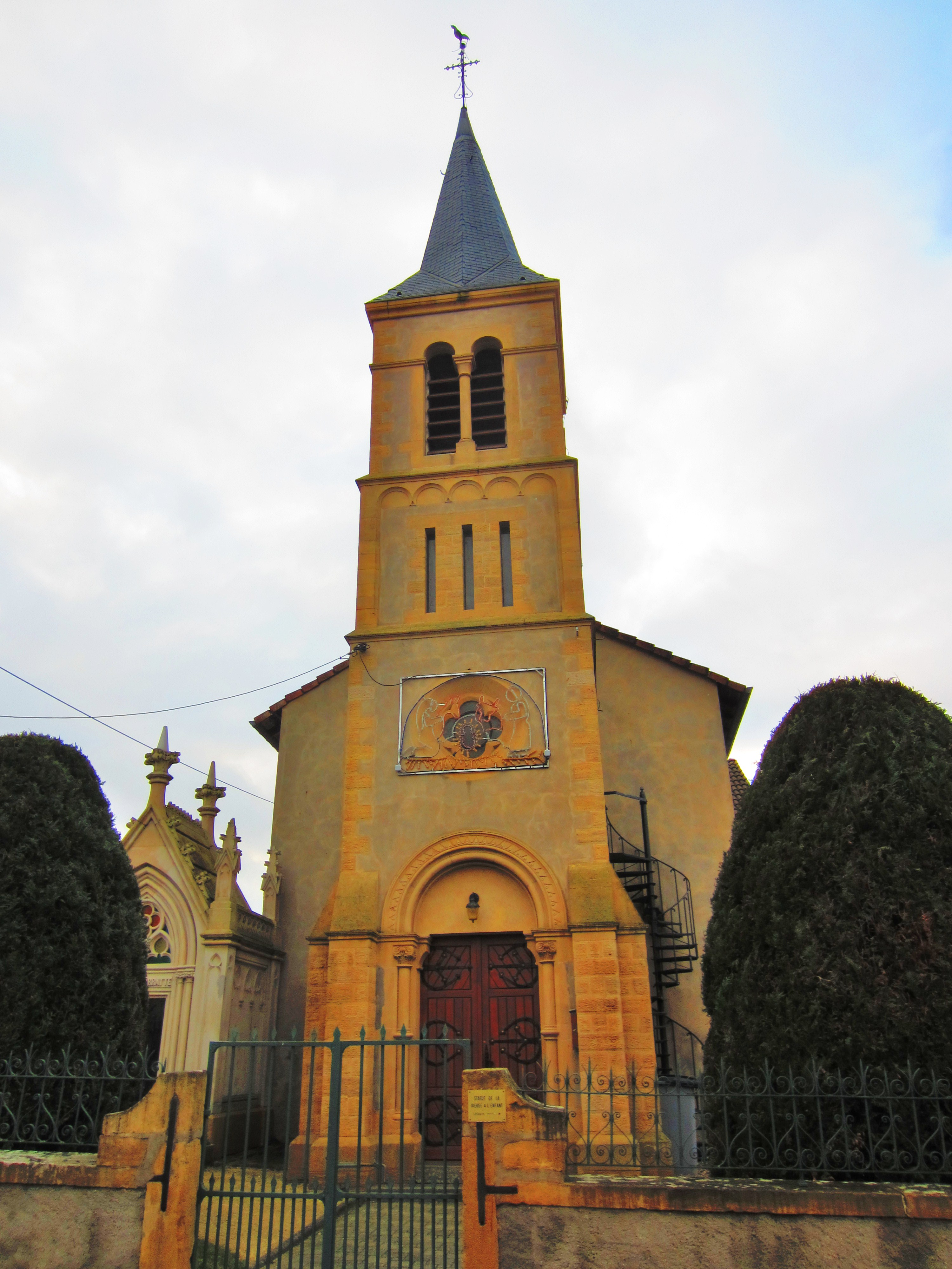 Description eglise Villers Laquenexy Date9 January 2012Sourcemon appareil photoAuthorAimelaimePermission(Reusing this file) eglise Villers Laquenexy